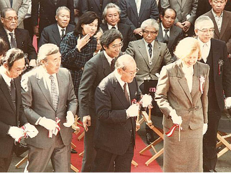 マリクレール通りオープニング模様（テープカット）